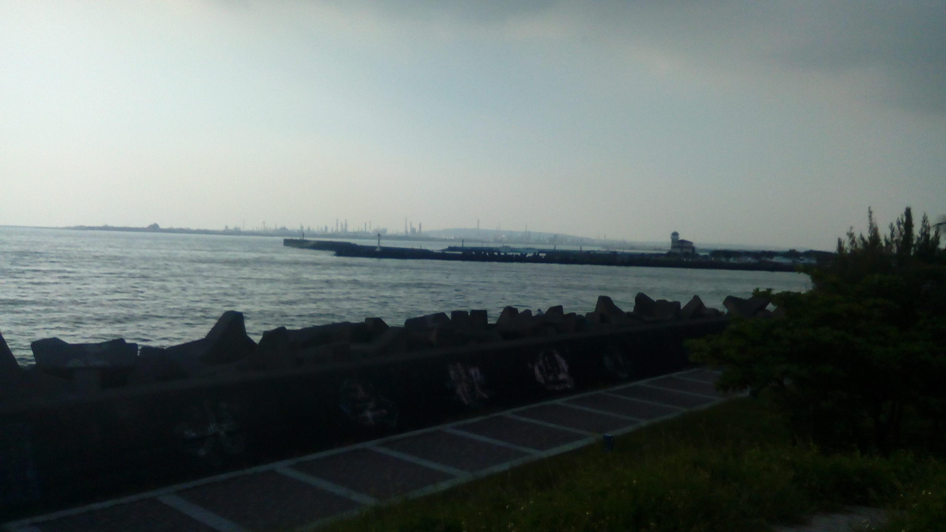 (1)高屏溪出海口 (2)林園工業區 (3)清水嚴